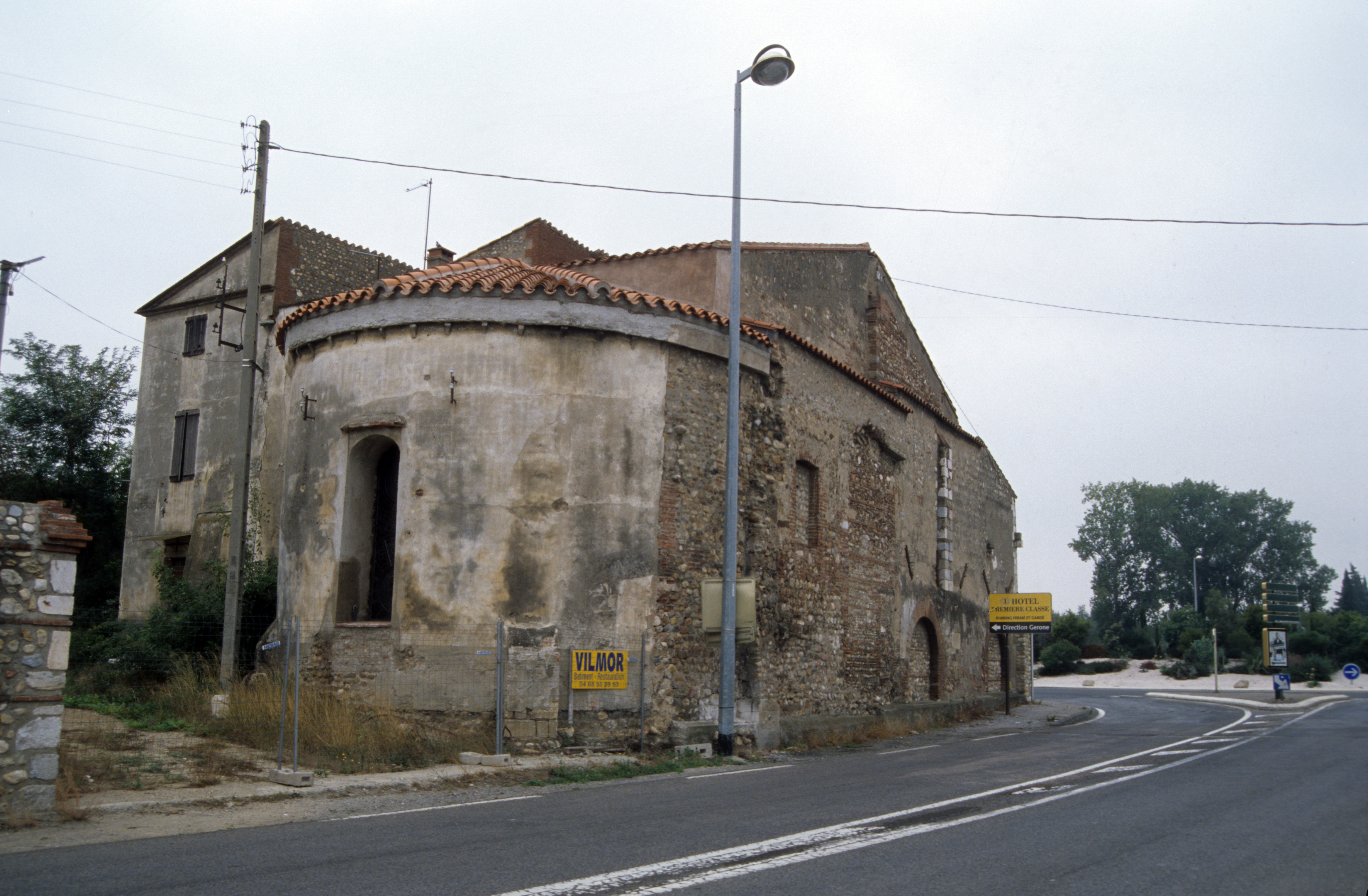 Orla (Perpinyà, Rosselló). Capella de la sotscomanda. Any 2007.